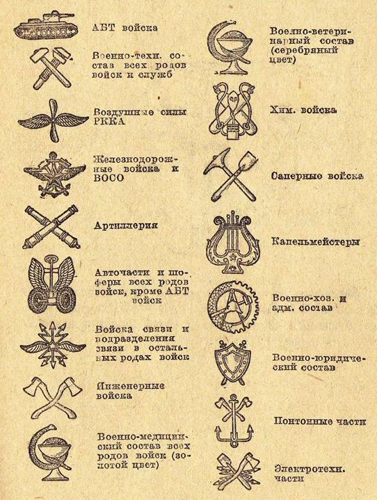 Эмблемы РККА образца 1936 года